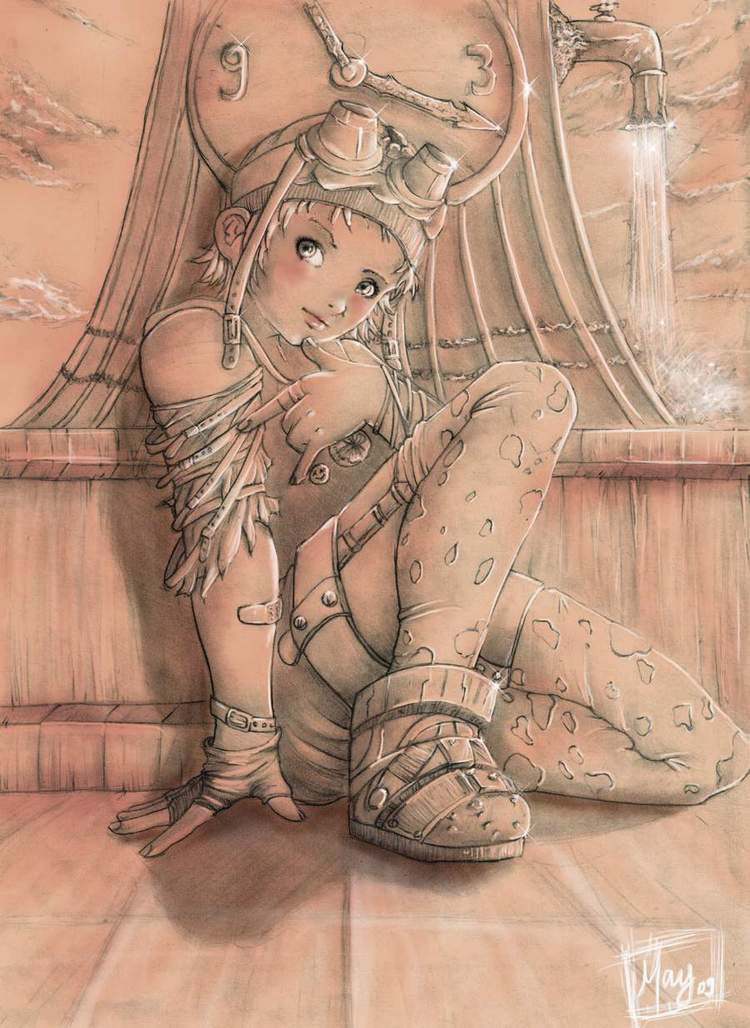 3. Platz des Wikipedia-Wettbewerbs bei Animexx in der Kategorie Beste Idee.